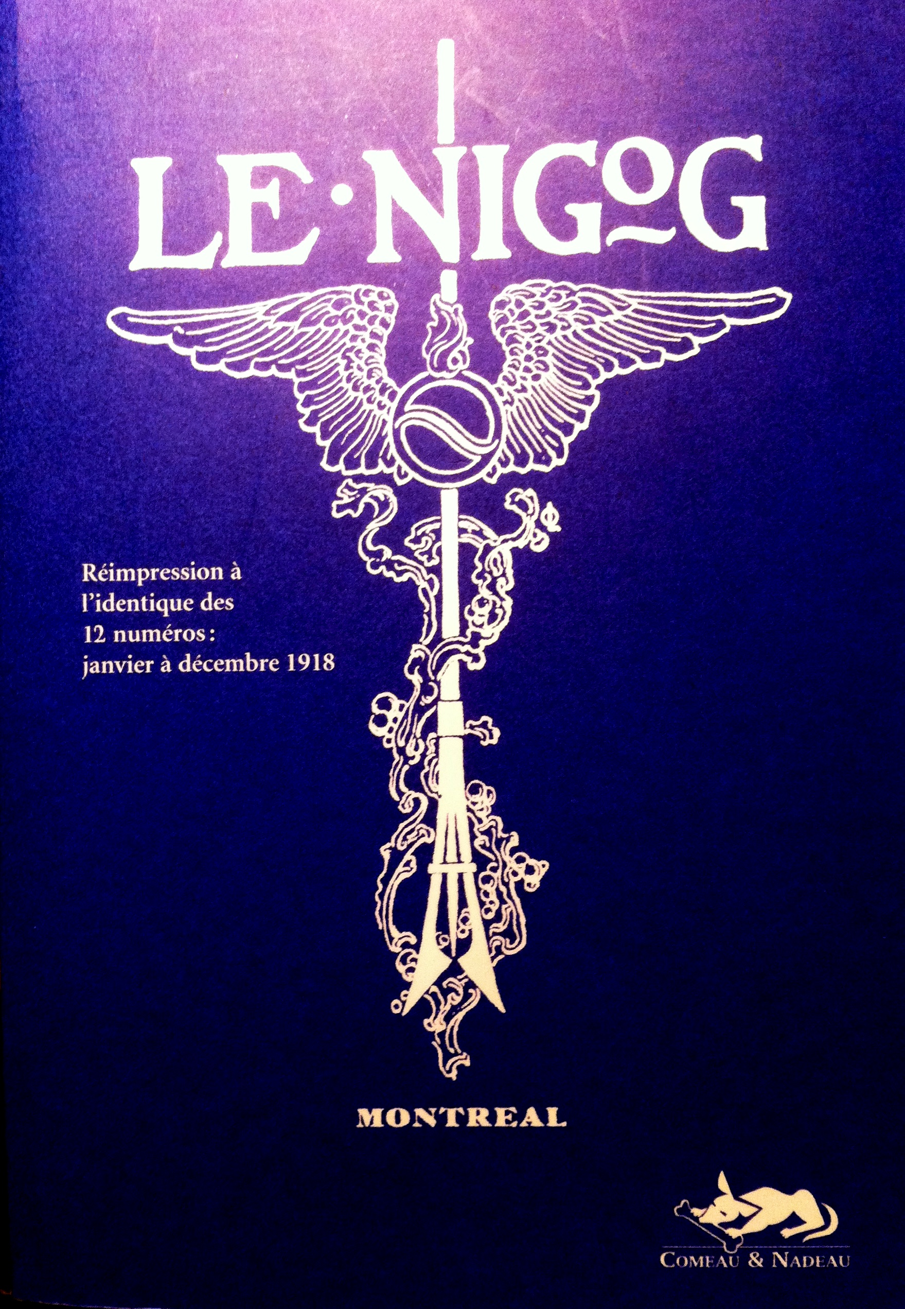 Ré-édition du Nigog par Comeau & Nadeau en 1998